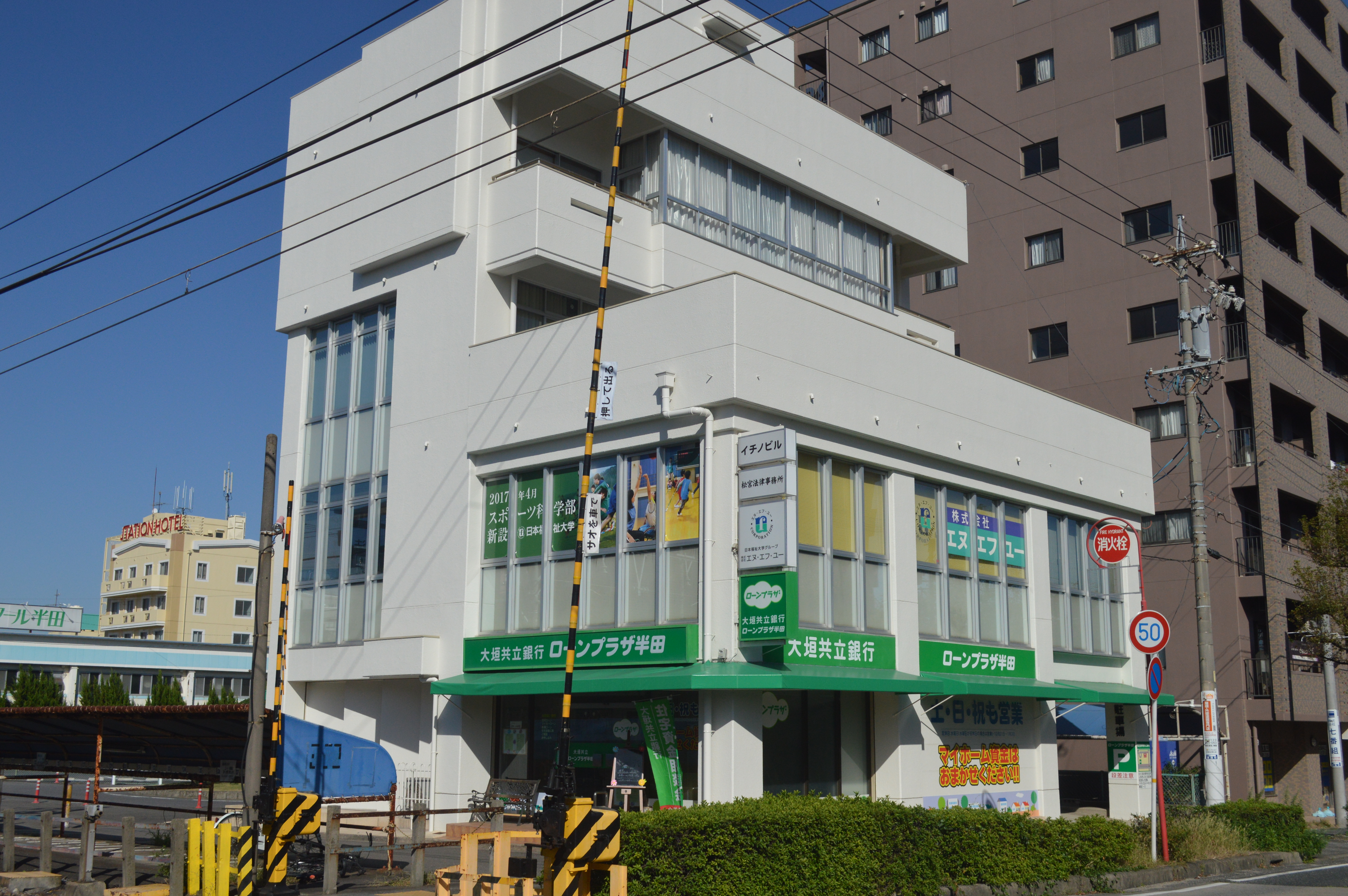 イチノビル。愛知県半田市宮路町。大垣共立銀行半田ローンプラザ、日本福祉大学グループ株式会社エヌ・エフ・ユー、松宮法律事務所などが入居。